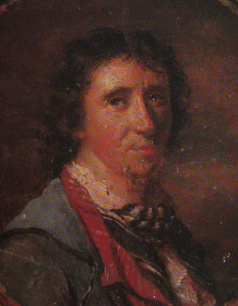 Portrait de Jean-Baptiste Carrier (1756-1794)